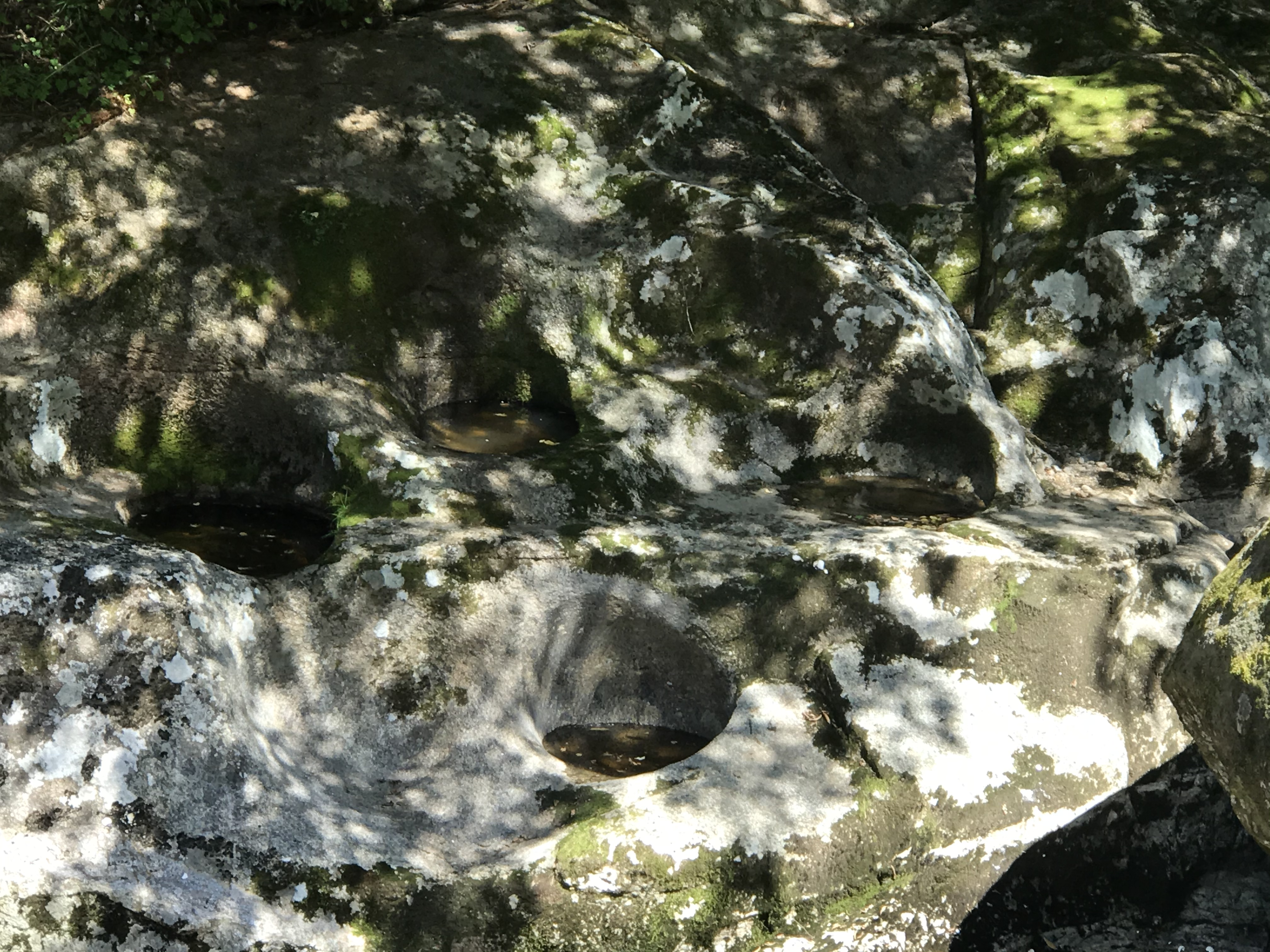 長野県下伊那郡根羽村池の平を流れる桧原川にある甌穴。桧原側の脇を通る長野県道10号線(設楽根羽線)から撮影。